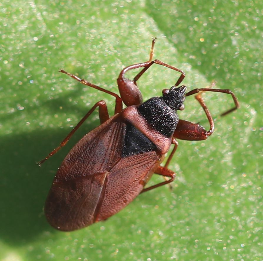 Kiefernzapfenwanze (Gastrodes grossipes), 8. August 2020, Totfund an Tabak